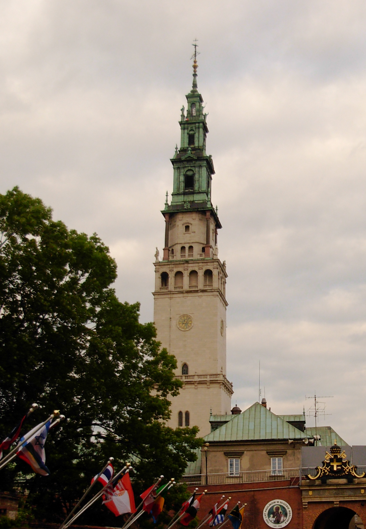 Čenstakavos Jasna Gora vienuolyno bažnyčios bokštas